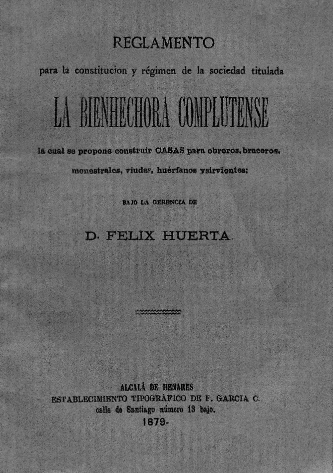 Portada del reglamento de la sociedad "La Bienhechora Complutense". Cuyo objetivo era "construir casas para obreros, braceros, menestrales, viudas, huérfanos y sirvientes". Publicado en Alcalá de Henares (Comunidad de Madrid - España) en 1879, por el impresor Federico García Carballo. Consta de 16 páginas y una gran hoja desplegable de 19x13 cm.